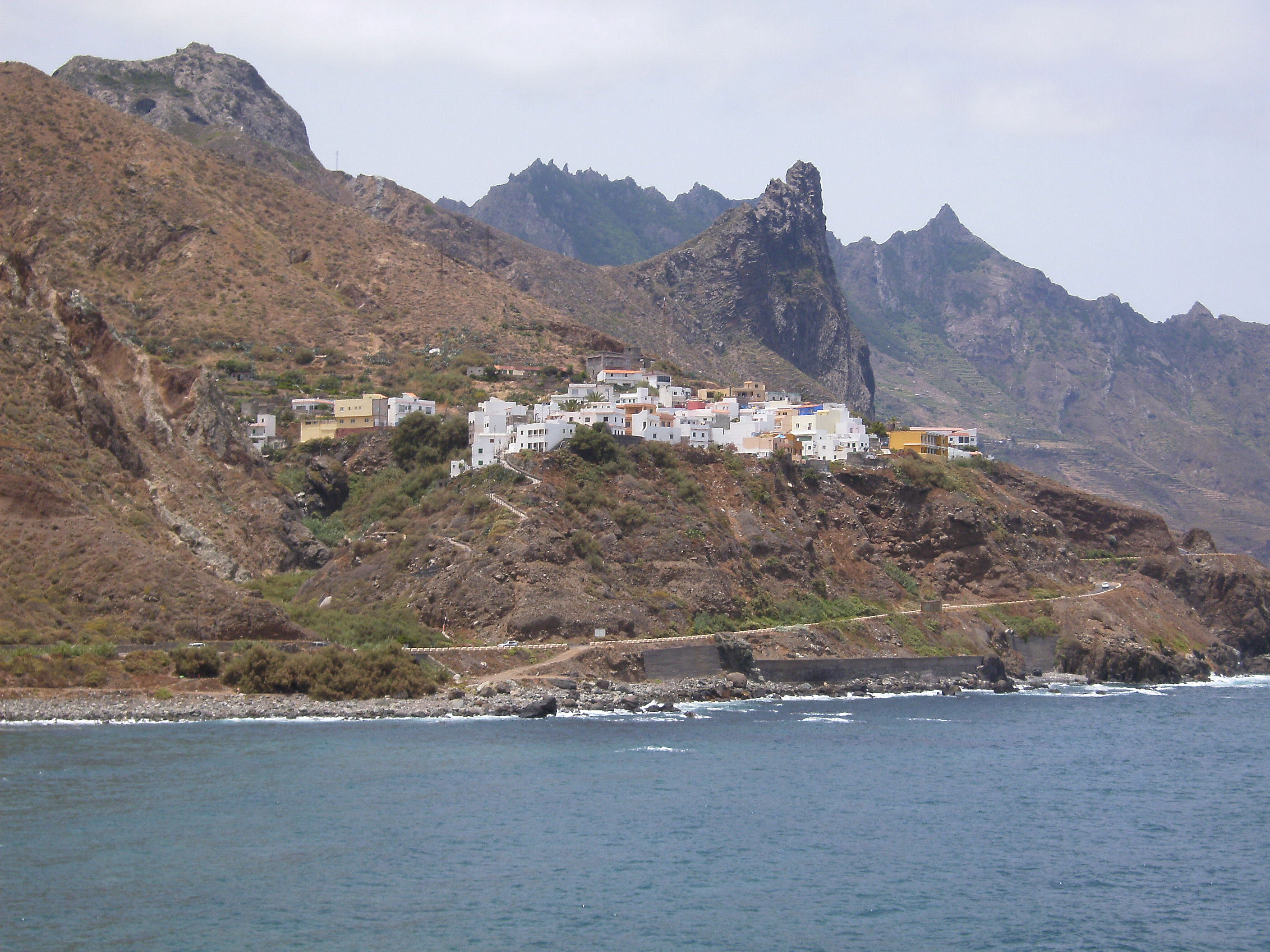 Vista del pueblo de Almáciga